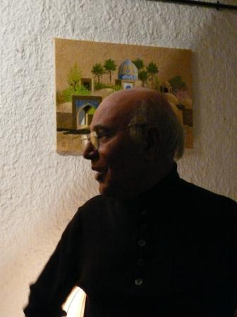 منزل استاد کلانتری